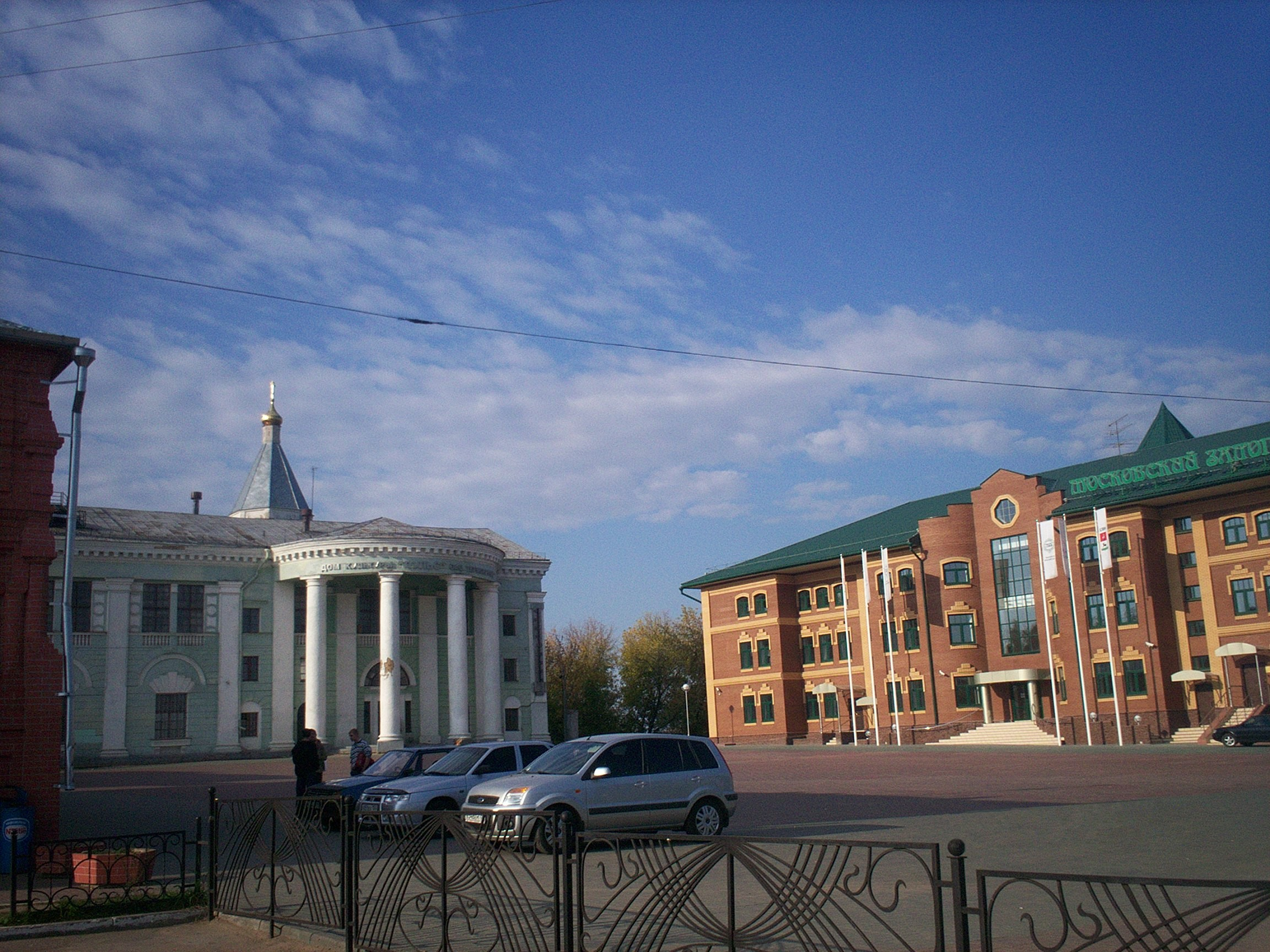 Советская площадь (г. Клин)